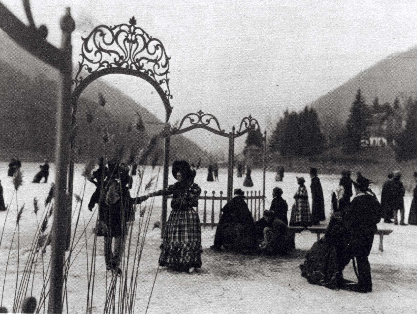 Fotogramma del film italiano Un colpo di Pistola, regia di Renato Castellani, produz Lux Film, Roma, 1942